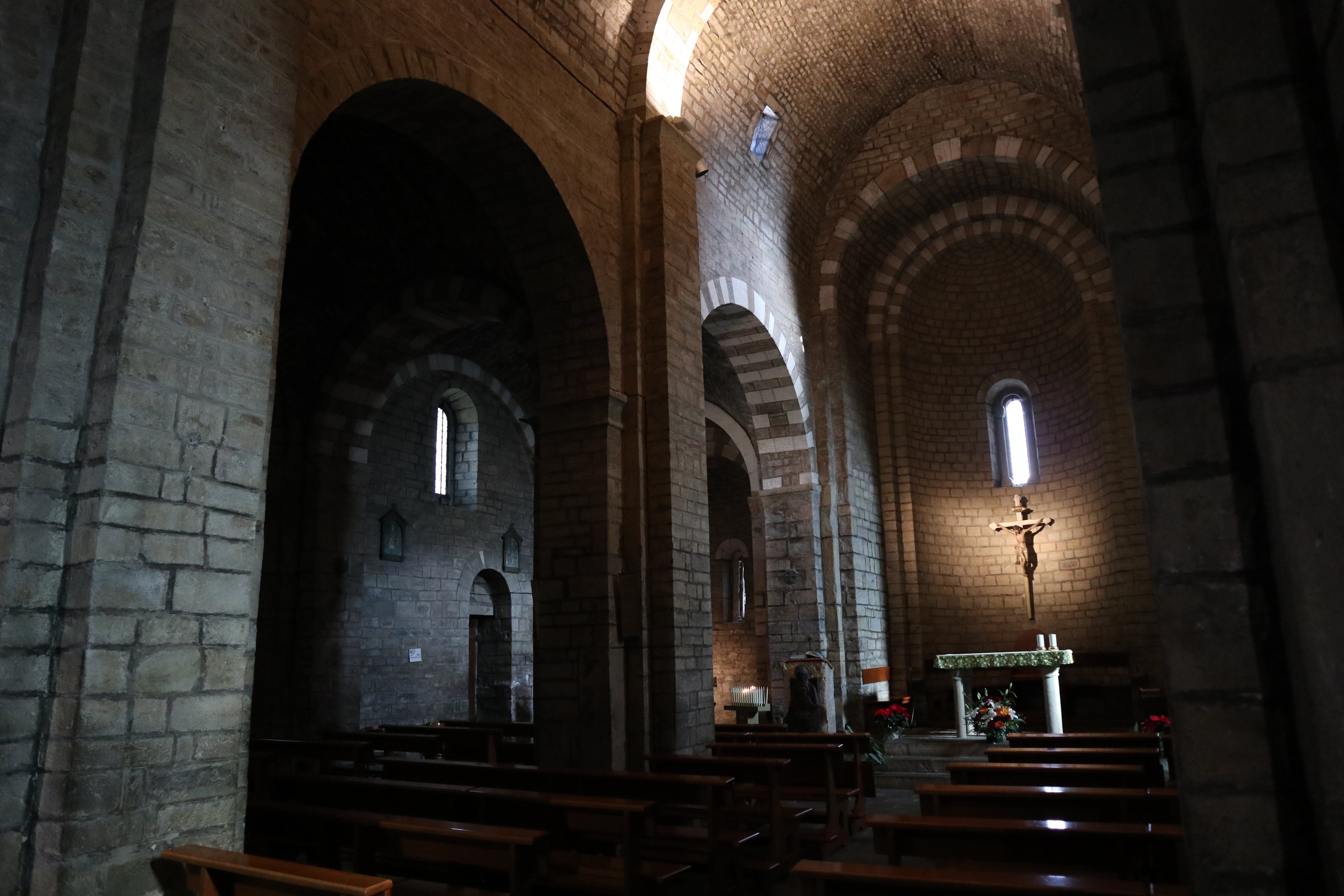 Interno